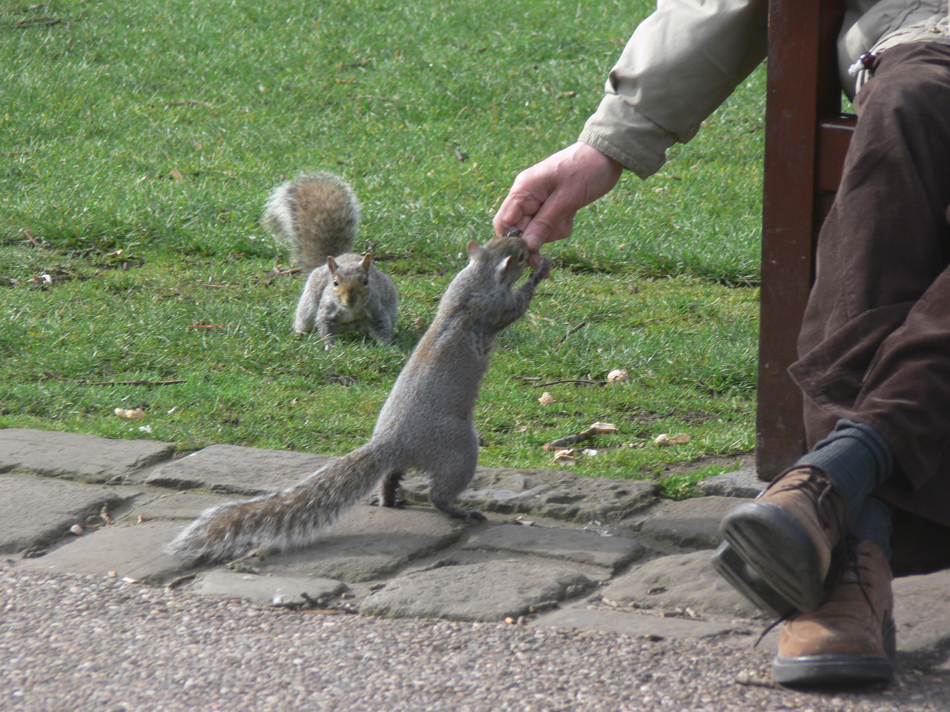 Eichhörnchen im Museumspark von York.